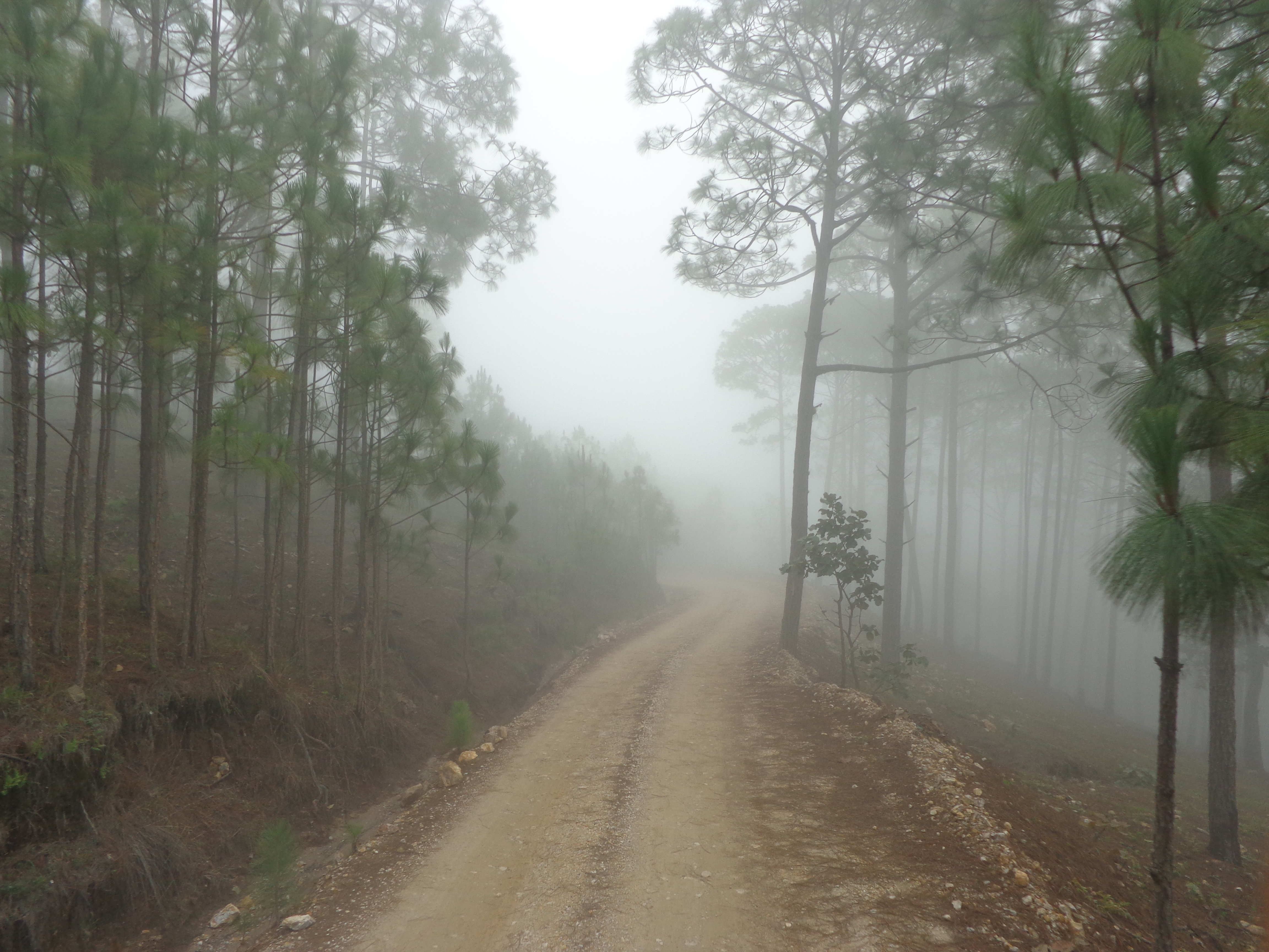 Sierra Madre Occidental, Huajicori, Nayarit